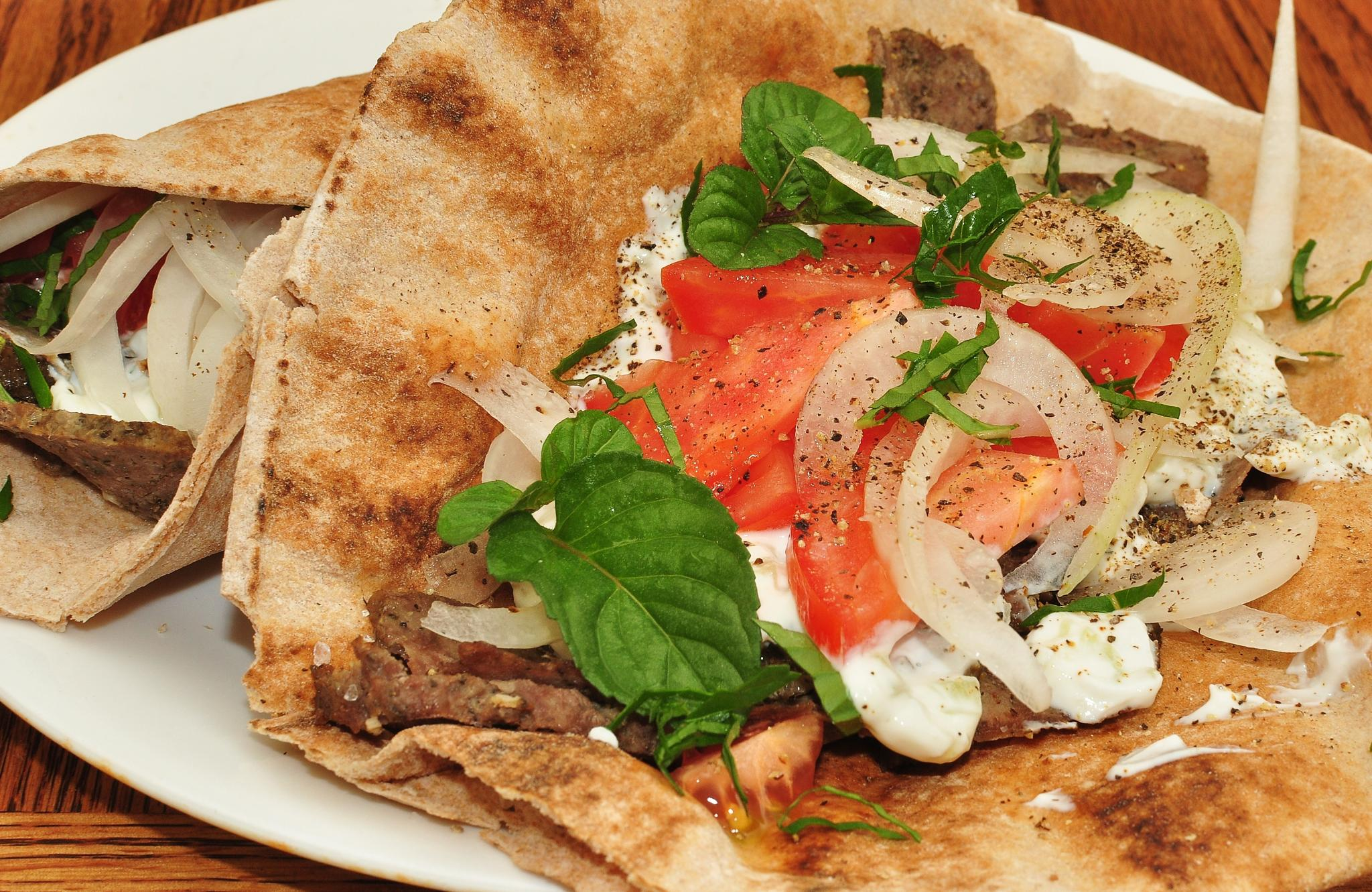 Mmm... we need more gyros